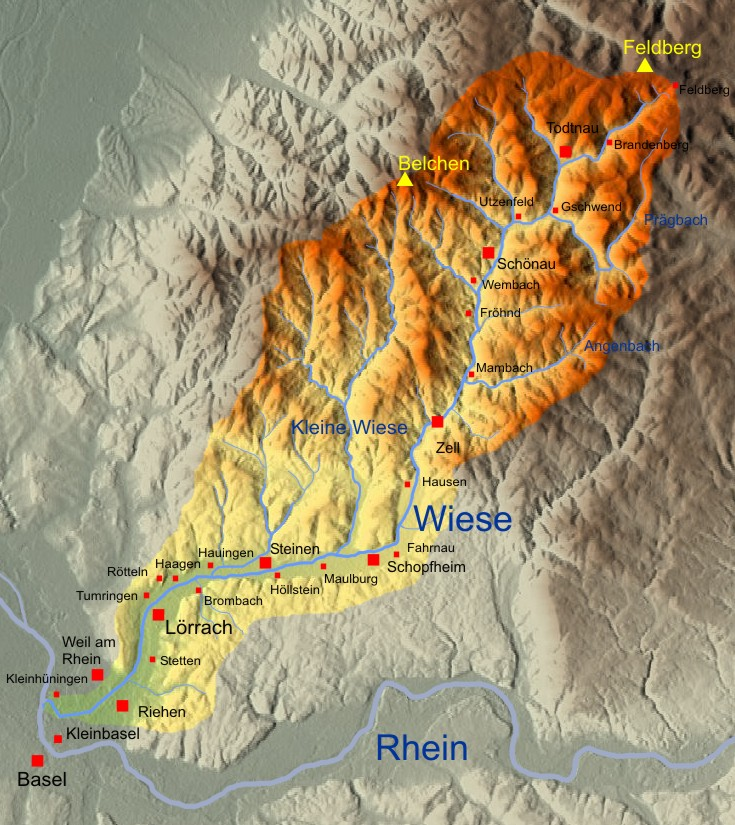 Einzugsgebiet und Flusssystem des Wiesentals